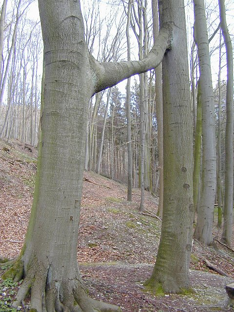 Geschwisterbuche (Fagus sylvatica) im Hollandsgrund im Göttinger Wald (Göttingen, Deutschland)